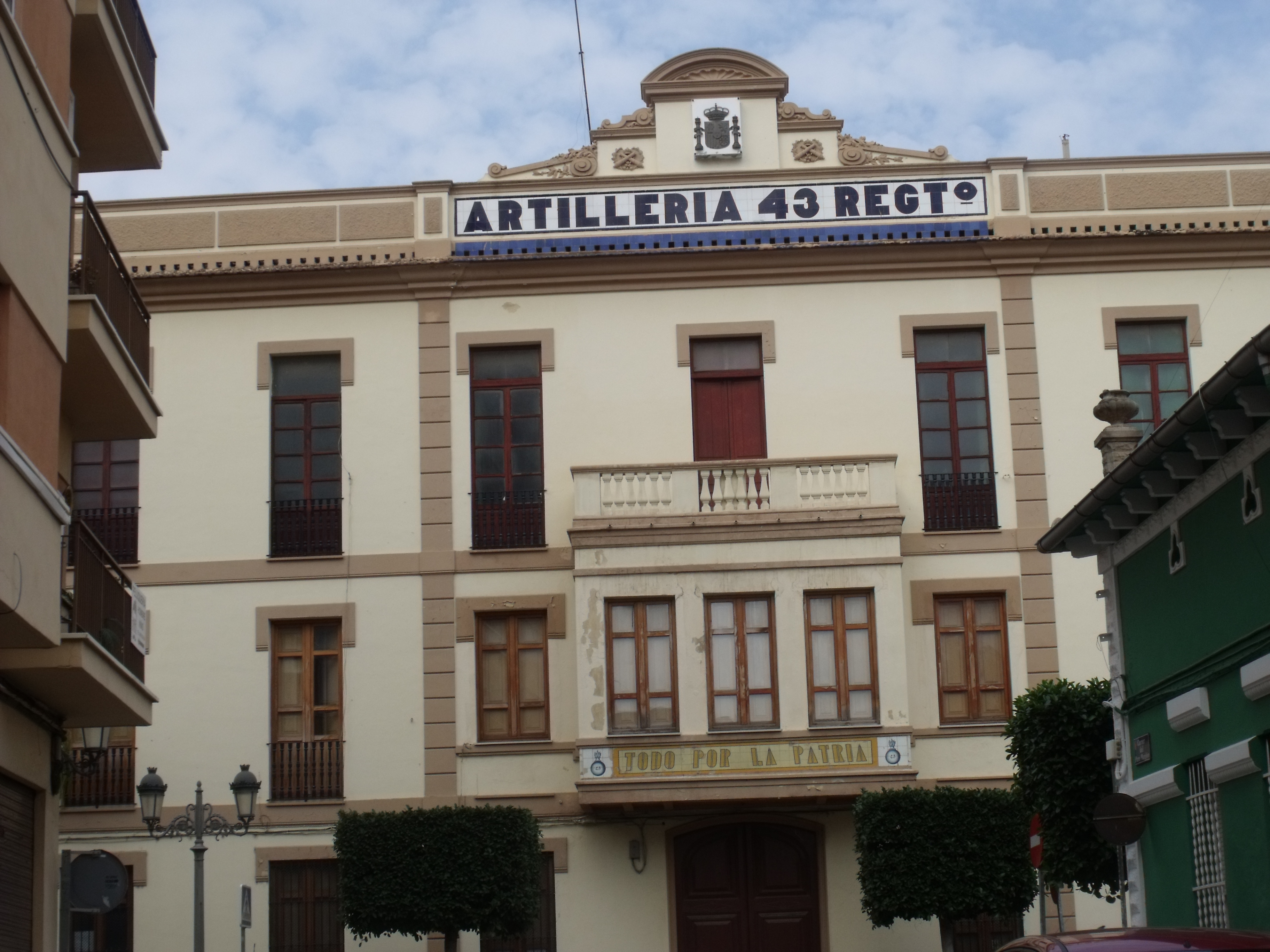 Fachada principal del acceso al acuartelamiento de la Avinguda de les Corts en Paterna.